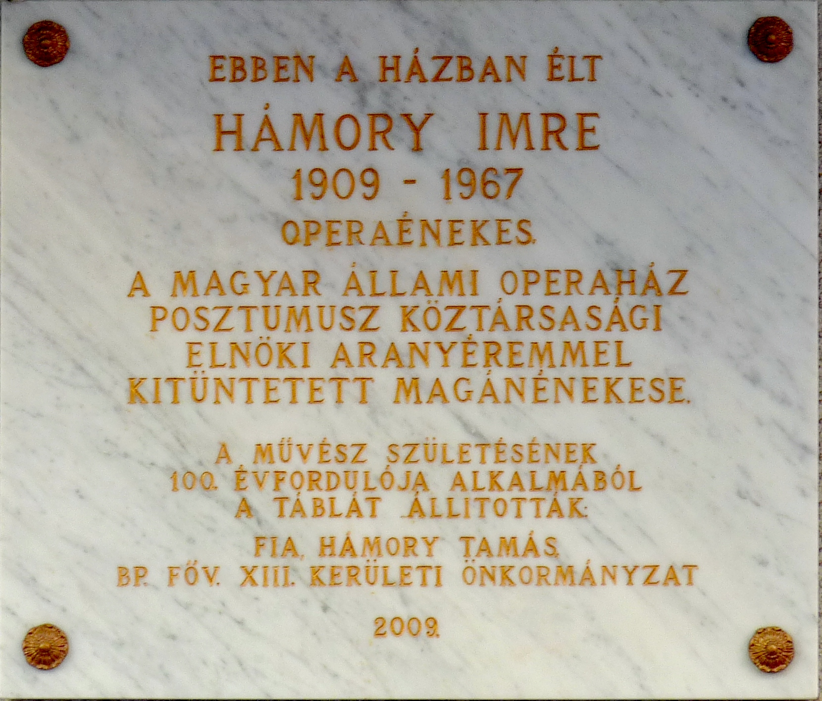 Hámory Imre (1909–1967) operaénekes, színész emléktáblája egykori lakóháza falán. Felavatva 2009. november 18-án. Budapest, XIII. ker. Tátra utca 23. sz.